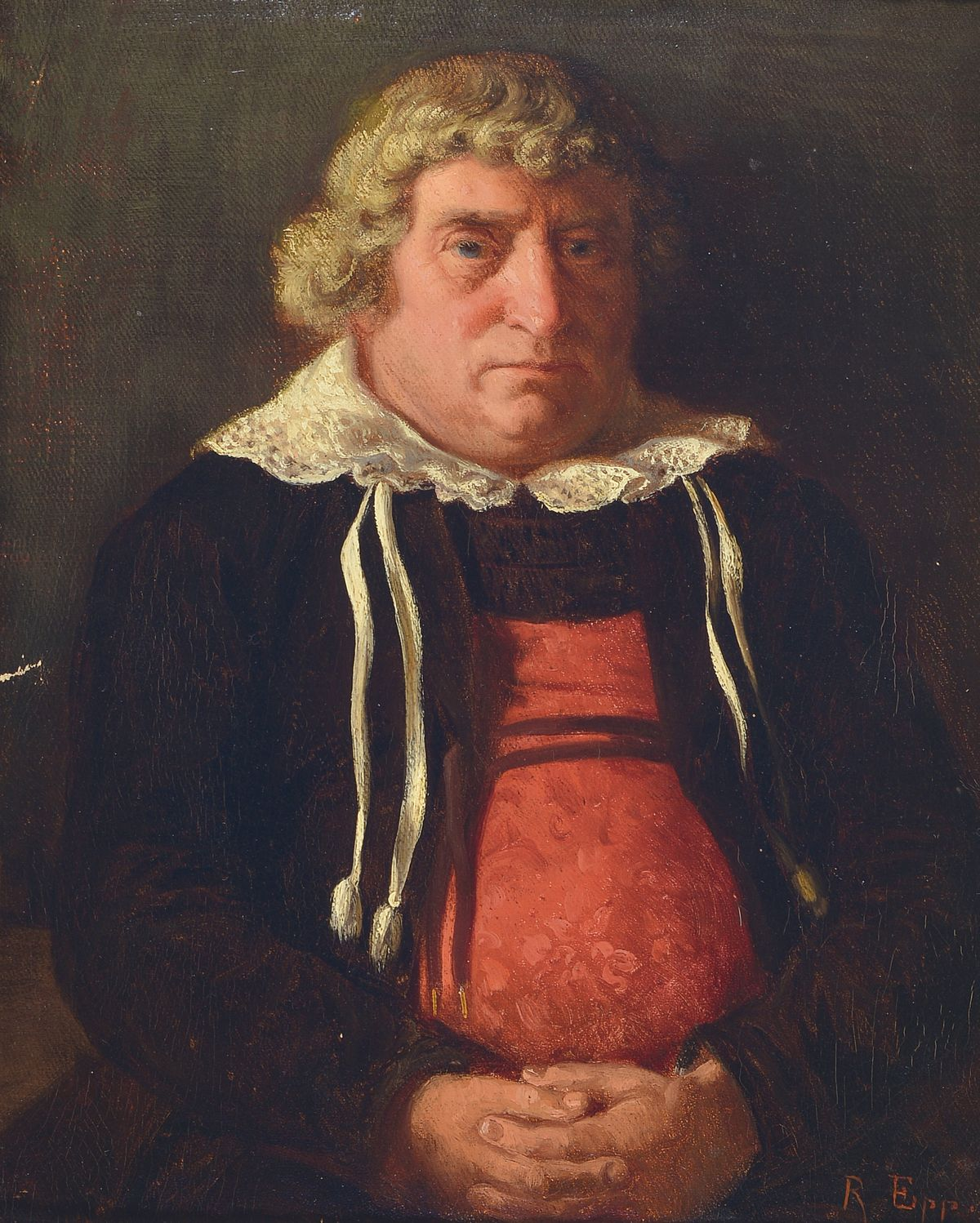 Rudolf Epp (1834-1910): Mann mit rotem Wams, signiert "R. Epp" und datiert [18]59 ca. 37x29cm, Lwd. auf Karton Henry’s Auktionshaus, Mutterstadt, 24.03.2018, Los 6016